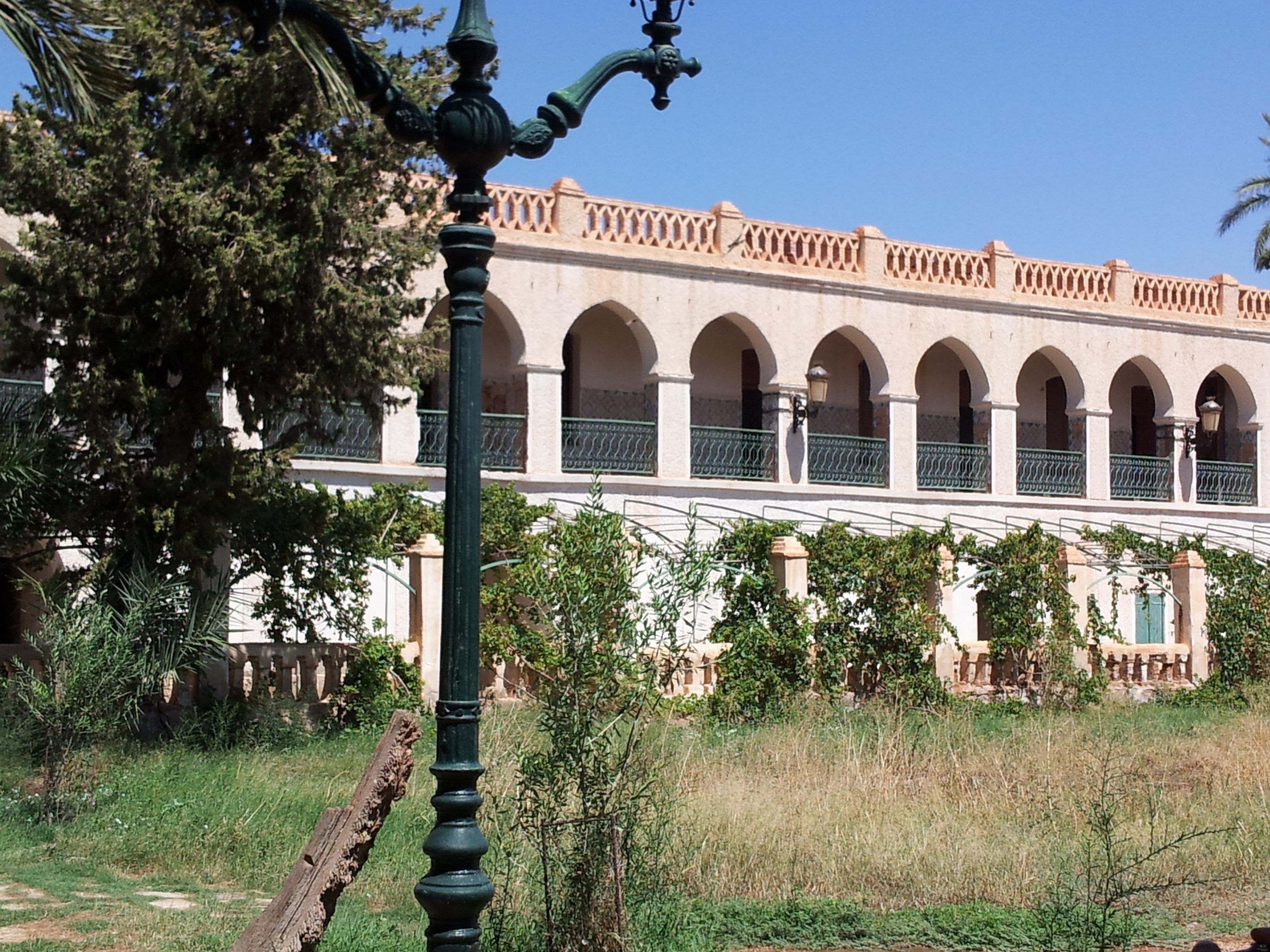 Vue sur le palais de Kourdane près de 'Aïn Madhi (Algérie)